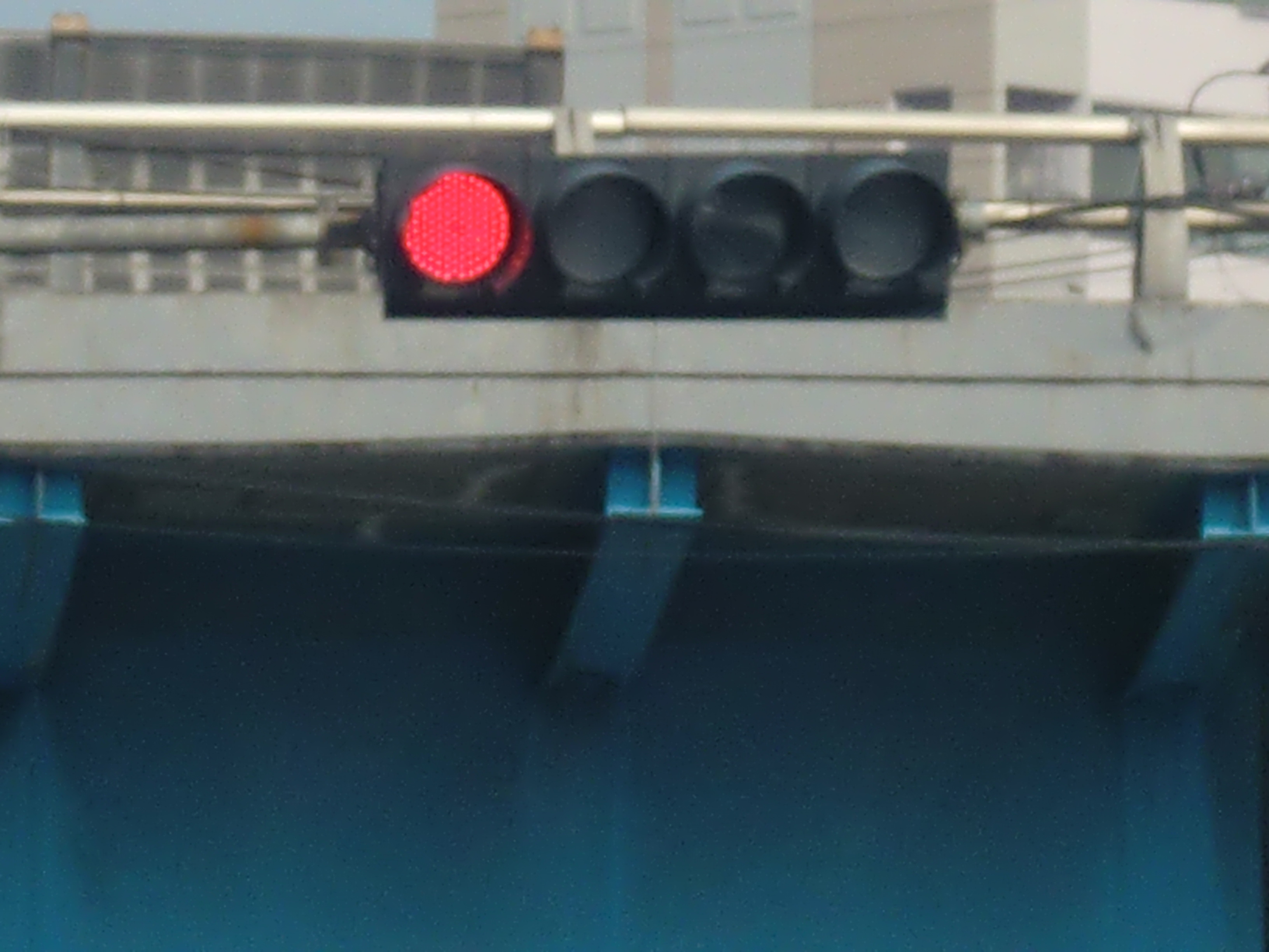 신호기(사색등)(적)부산시 남구에서 촬영